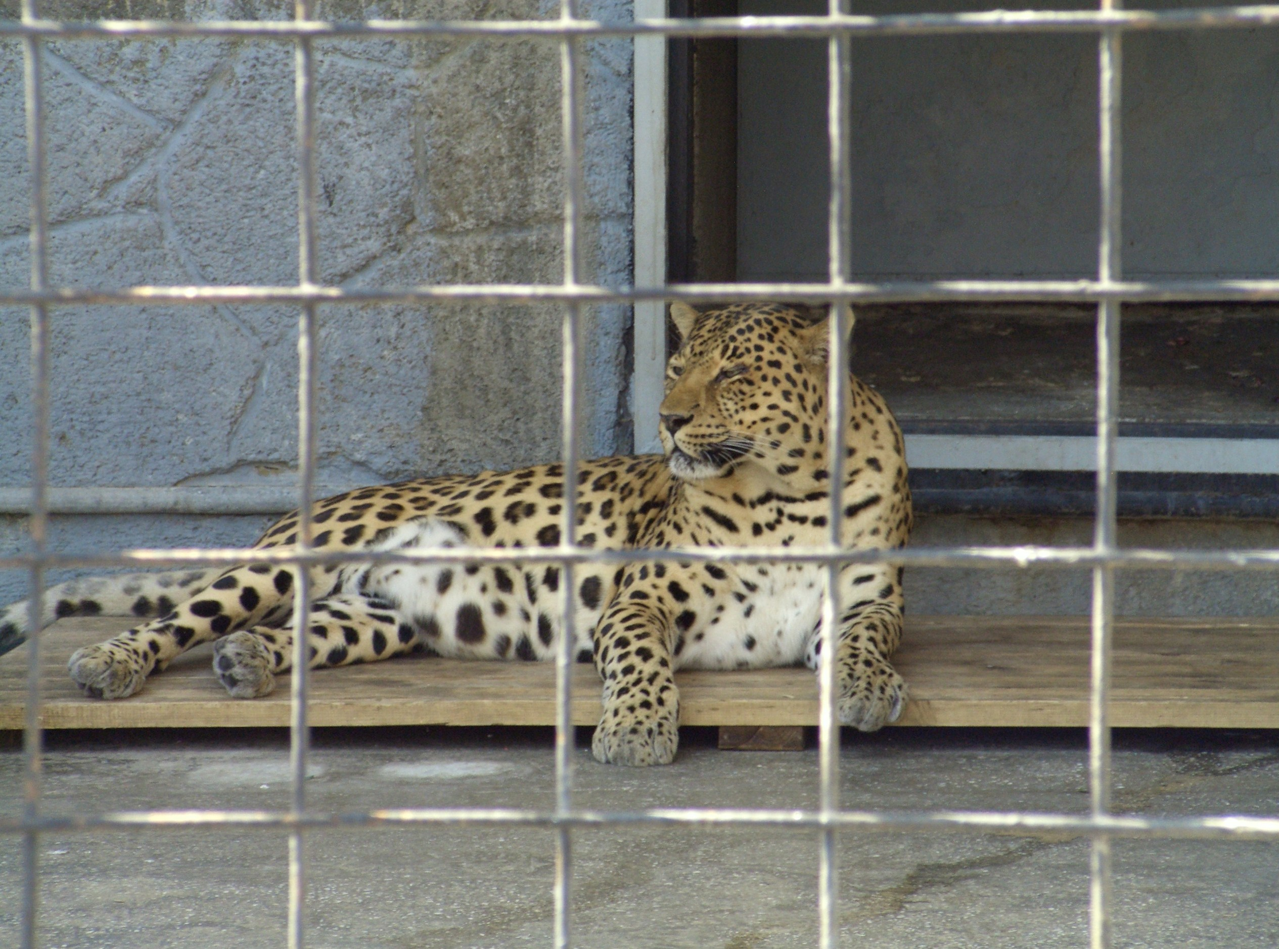 Tsentralnyy rayon, Chelyabinsk, Chelyabinskaya oblast', Russia